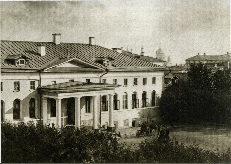 Англиканская церковь в доме Колычева в Большом Чернышёвском (ныне Вознесенском) переулке. В 1882—1884 годах на этом месте было построено новое здание Англиканская церковь cвятого Андрея.